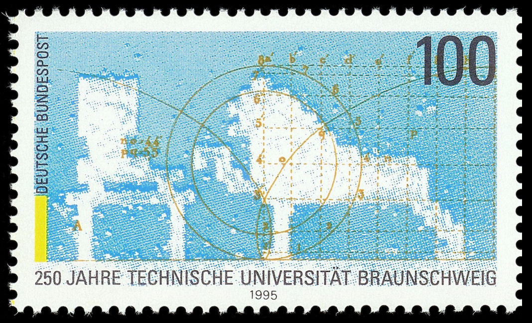 Briefmarke der Deutschen Post AG aus dem Jahre 1995, 250 Jahre Technische Universität Braunschweig